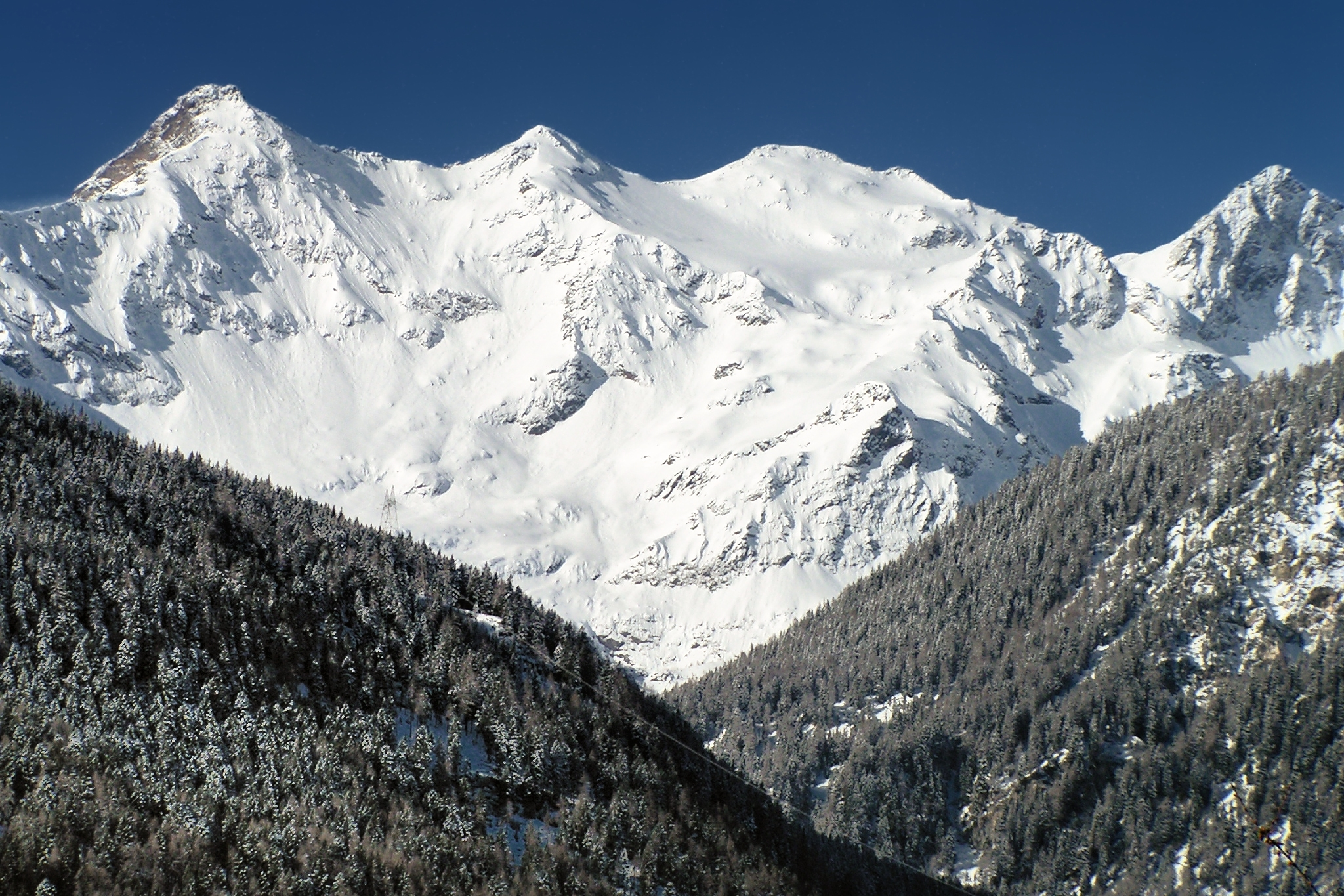 Campo Tencia - fatta da Elvezio